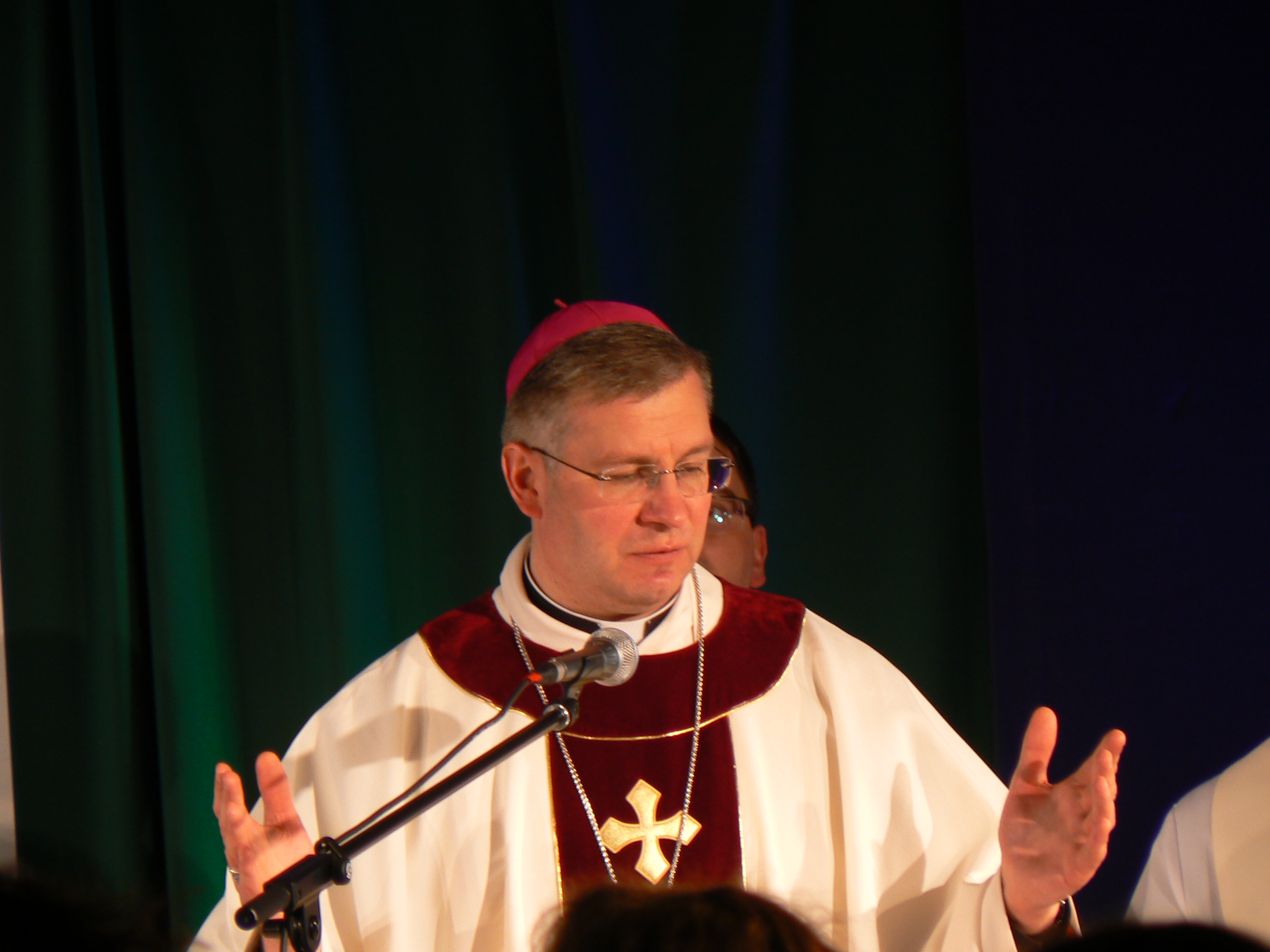 Telšiaiský biskup Kęstutis Kėvalas